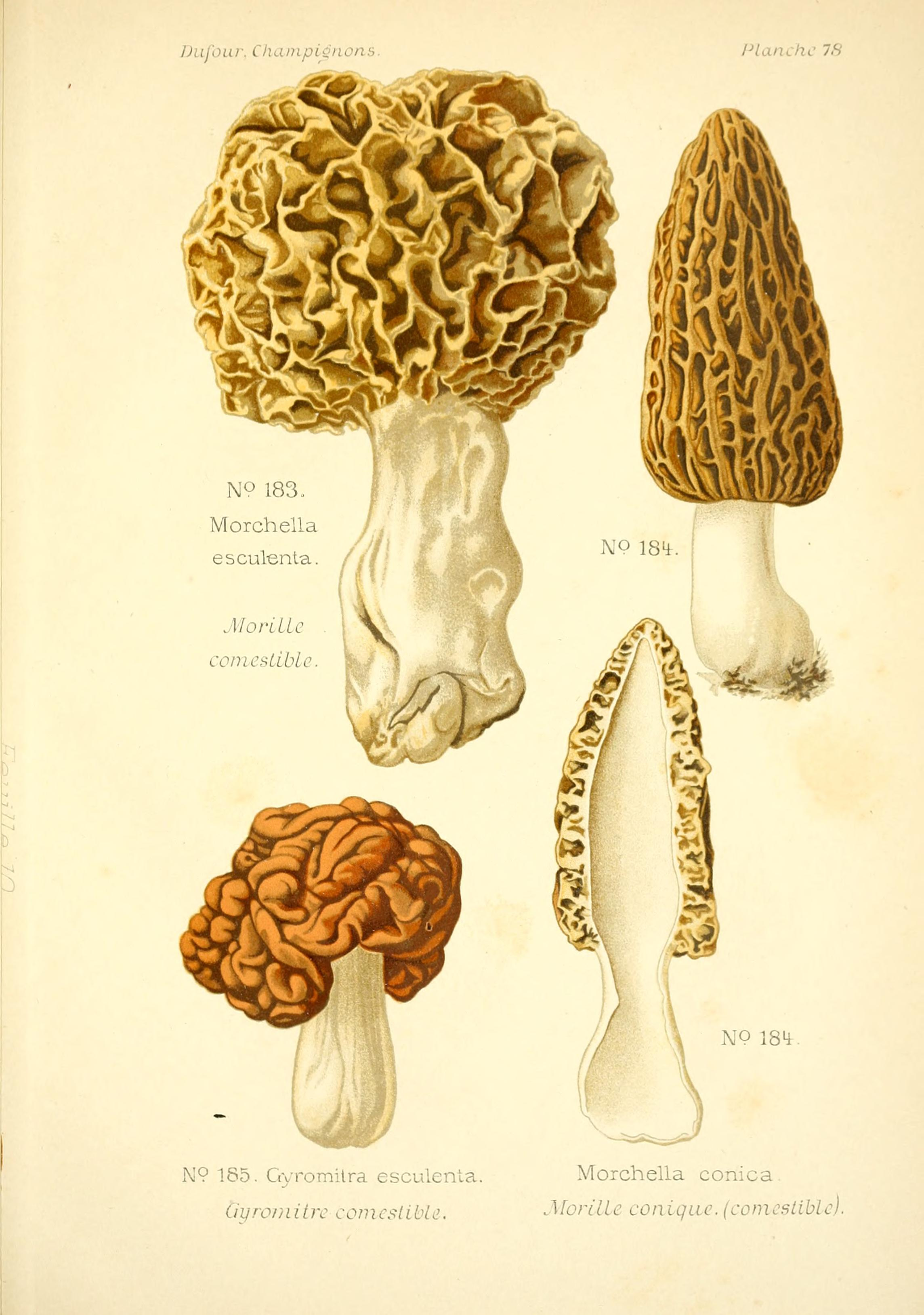 Atlas des champignons comestibles et vénéneux.